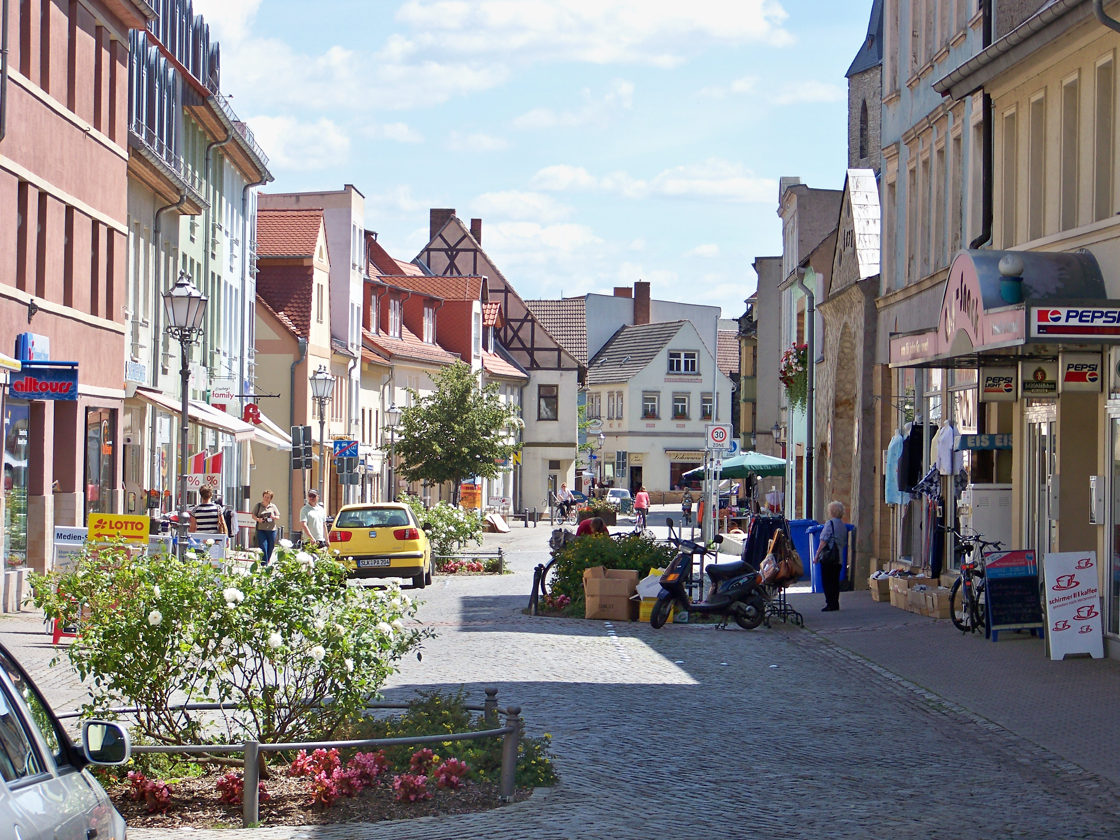 Löwestraße!! in Calbe (Saale)